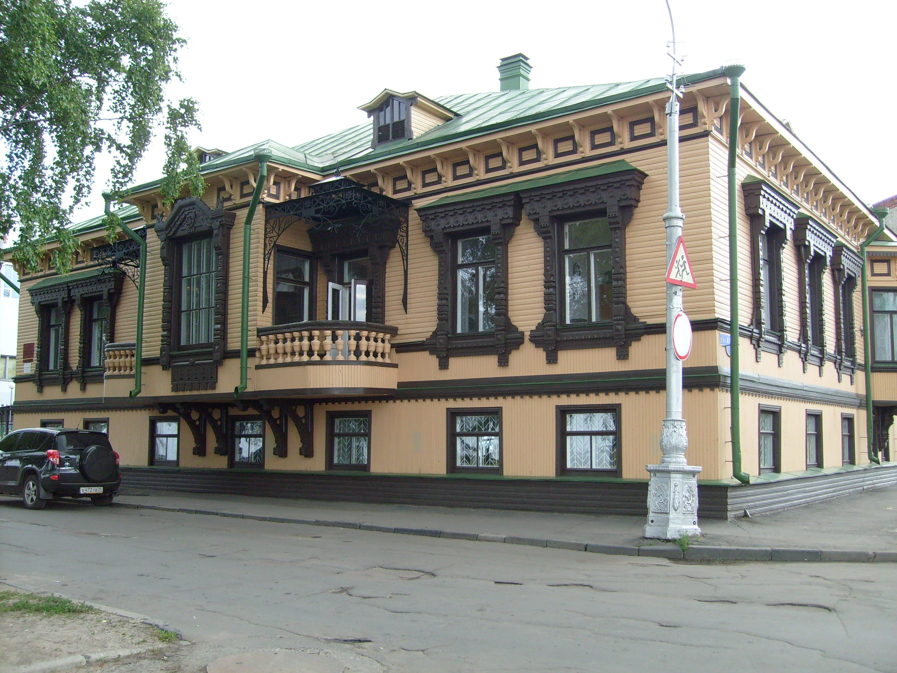 Здание на пересечении Набережной Северной Двины и улицы Попова. Дом Суркова, ул. Попова, д. 1, памятник архитектуры Архангельска, построен в 1851 году